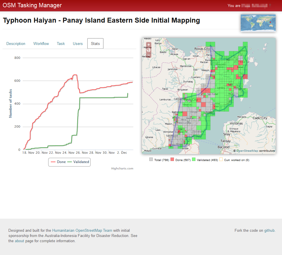 Screenshot OSM Tasking Manager